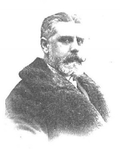 Sr. D. Luis Moreno Gil de Borja, nuevo marqués de Borja. Fotografía de Christian Franzen.